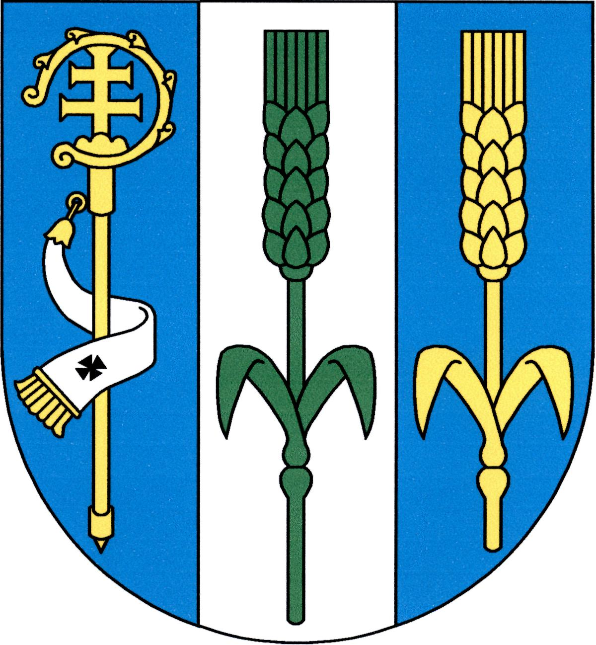 Znak obce Výškov